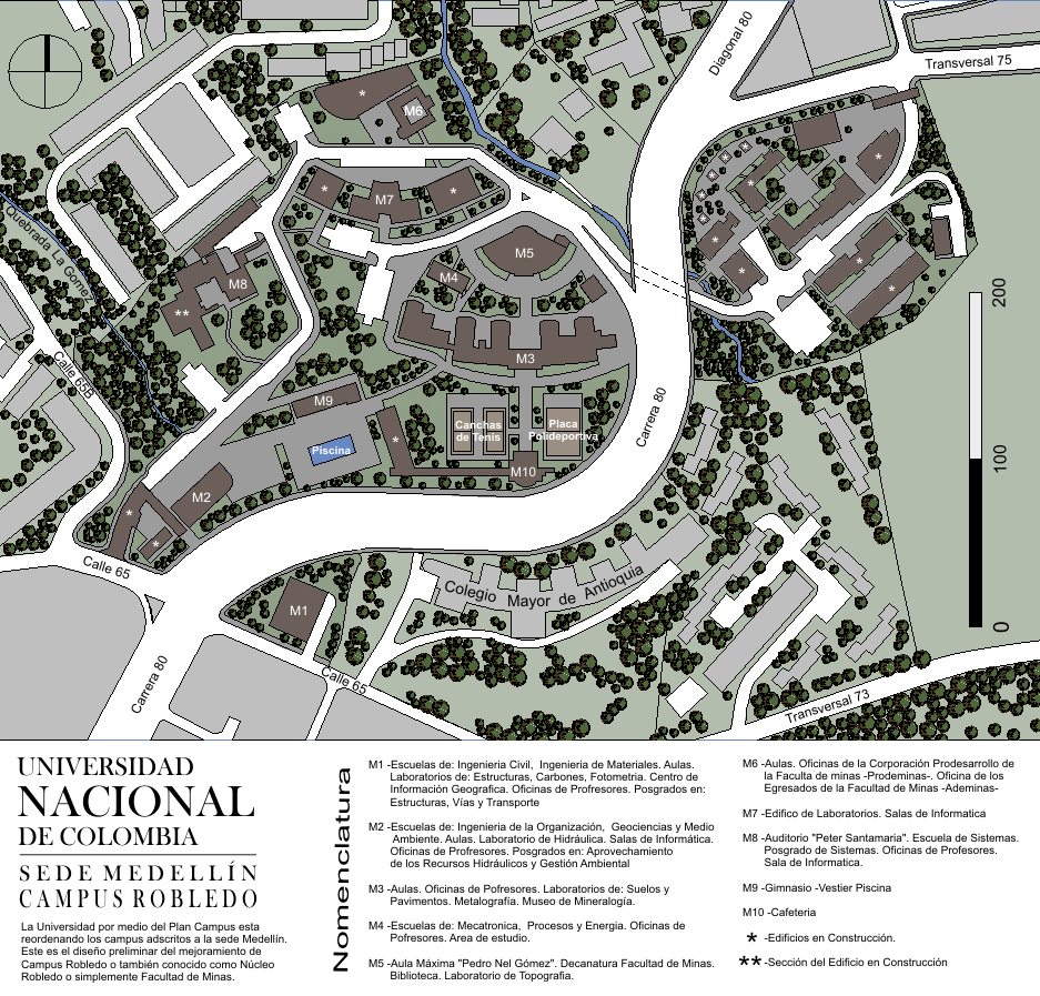 plano de la Universidad Nacional de Colombia sede Medellín, Campus Robledo. El mapa esta basado en folletos universitarios, si contiene algún error, favor notifíquelo en mi página de usuario, en la sección discusión.